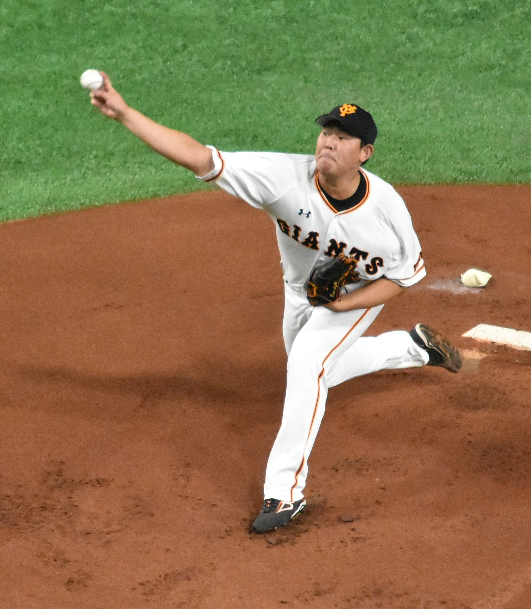 読売巨人軍 山口 俊